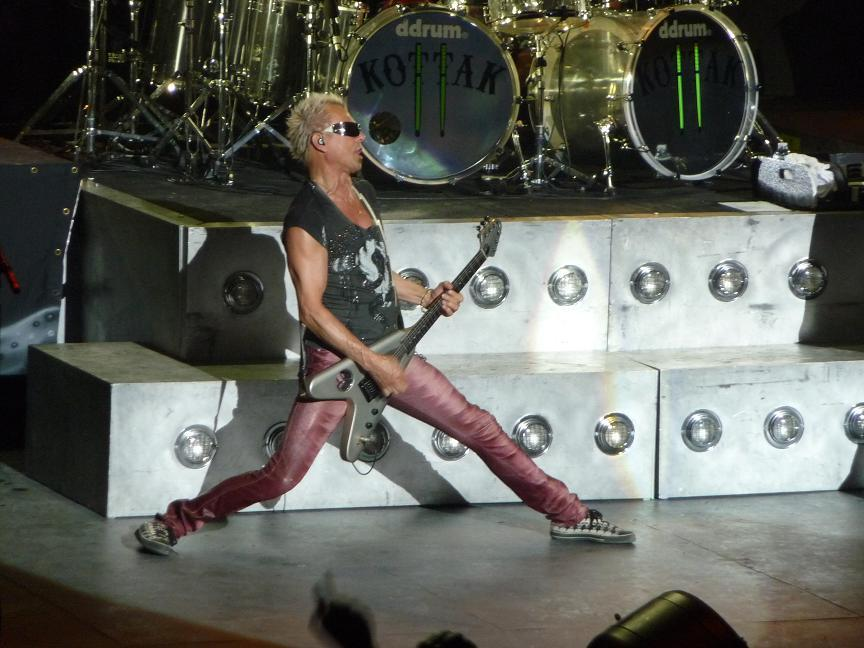 Rudolf Schenker le 28 Juillet 2009 à Carcassonne.